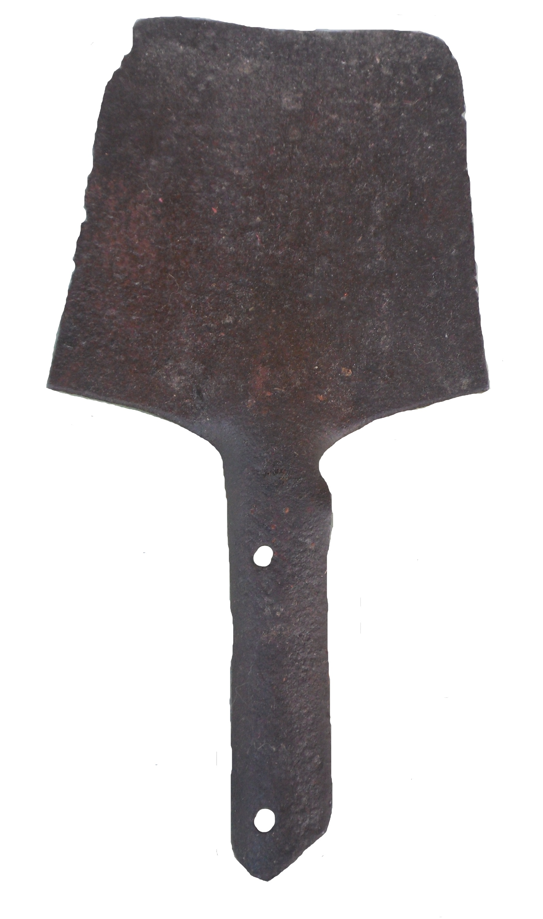 Hârleț Linnemann din Primul Război Mondial. Din colecția personală.